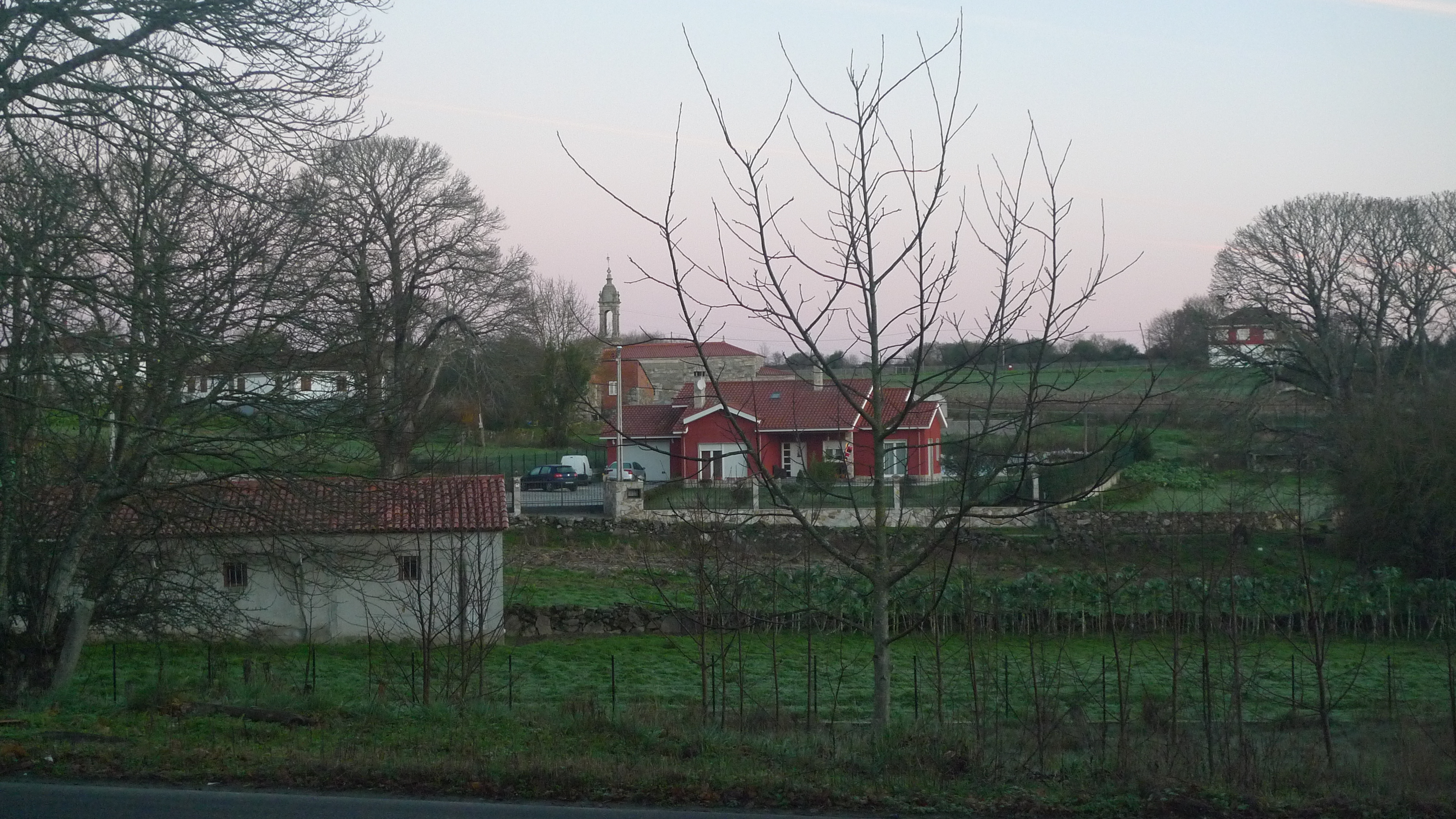 San Xurxo de Asma (Chantada)